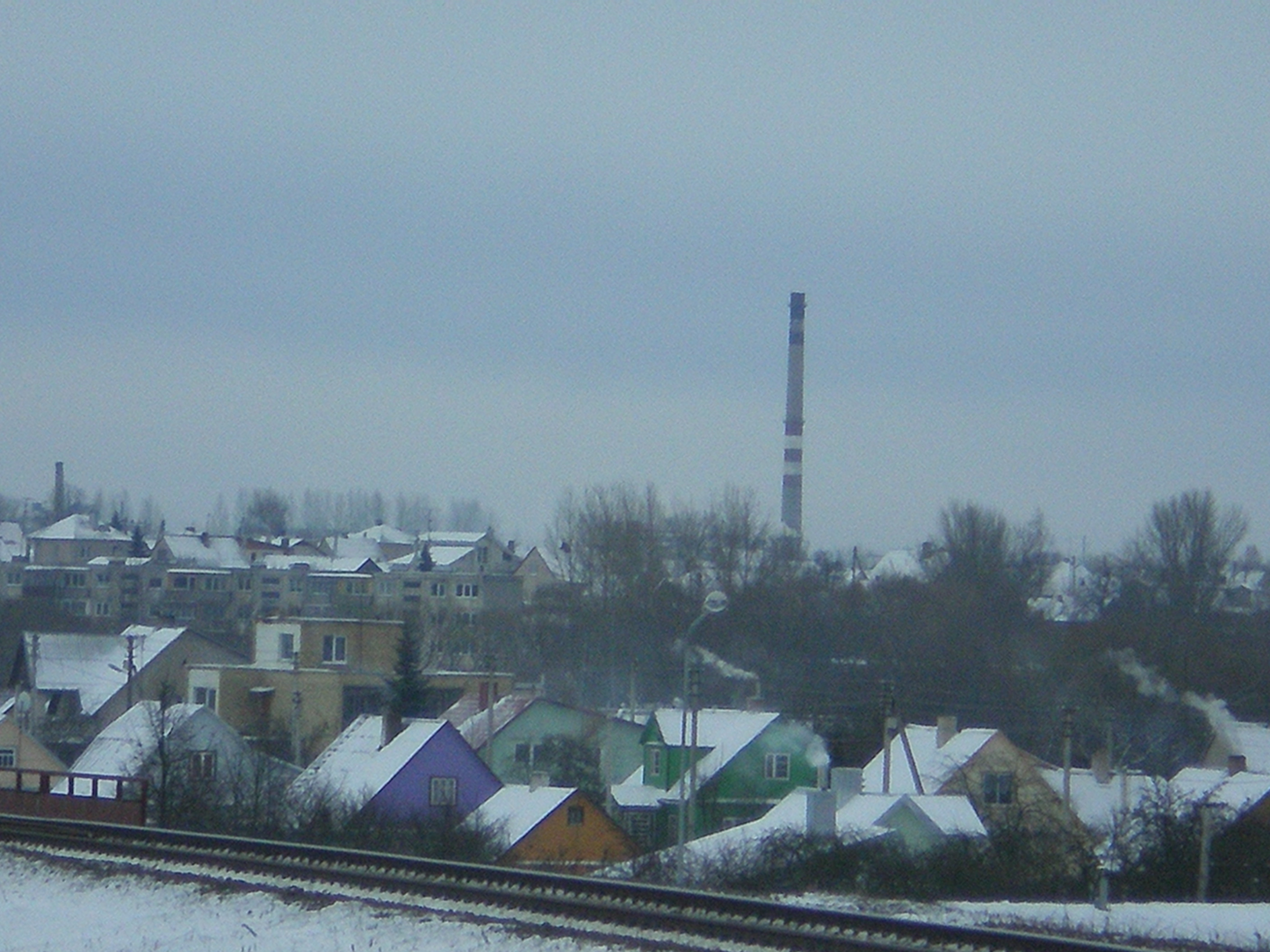 Kėdainių šiaurinės dalies vaizdas